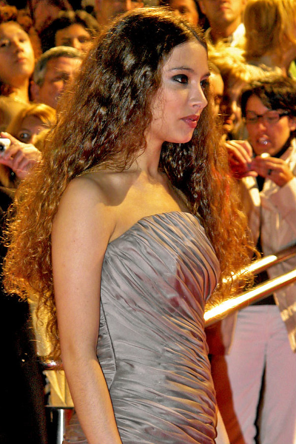 Yohana Cobos